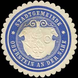 Sealing stamp Title: Stadtgemeinde Oberstein an der Nahe Description: blau, weiß, geprägt Place: Oberstein/Nahe size: 4 cm